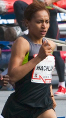 ISTAF Berlin 2012, 800m: Francine Niyonsaba, Halima Hachlaf